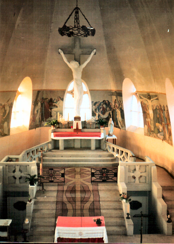 Le choeur vu de la tribune - Photo par moi-même